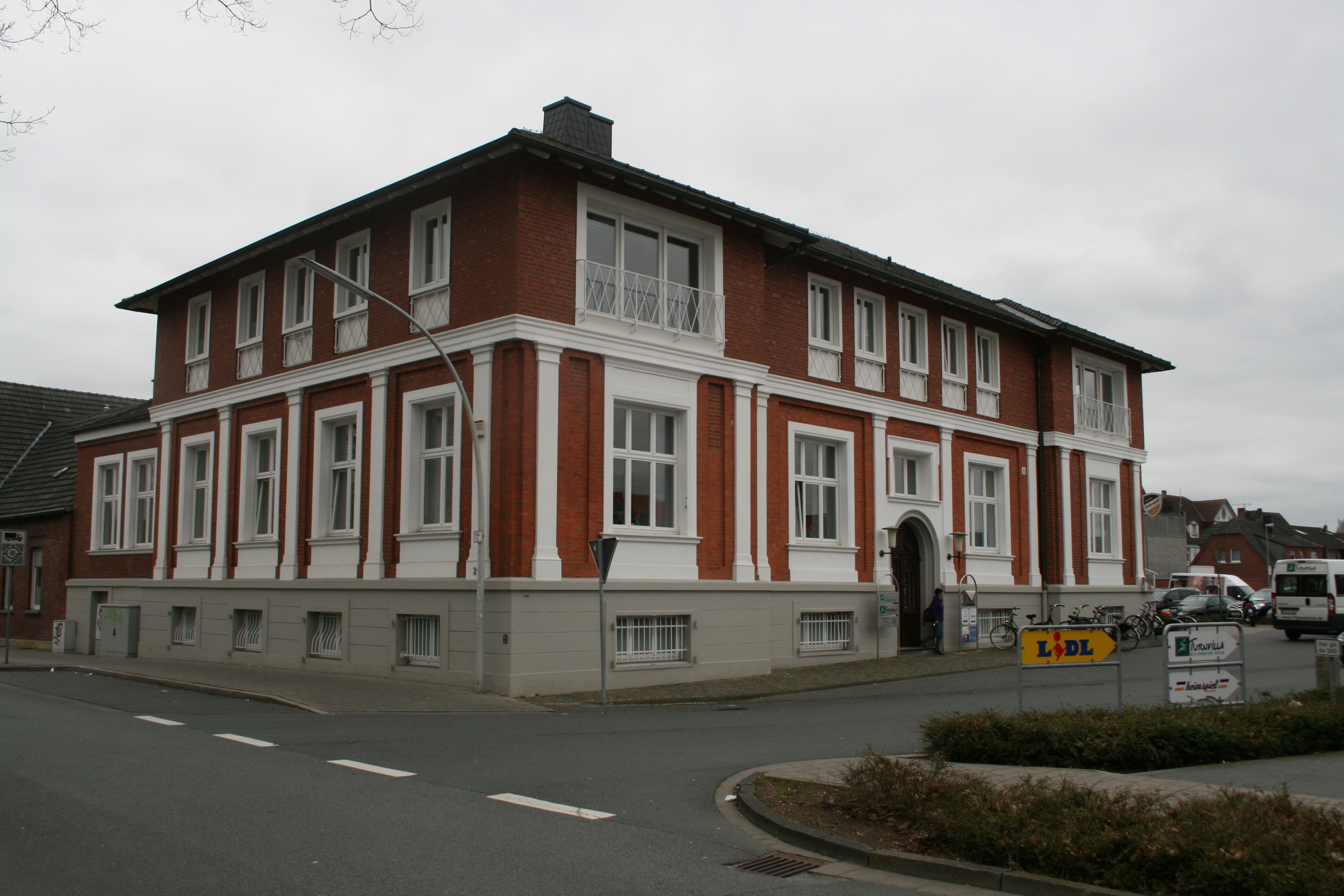 TurnVilla des TV Emsdetten 1898 e.V. an der Kolpingstraße 2 in 48282 Emsdetten